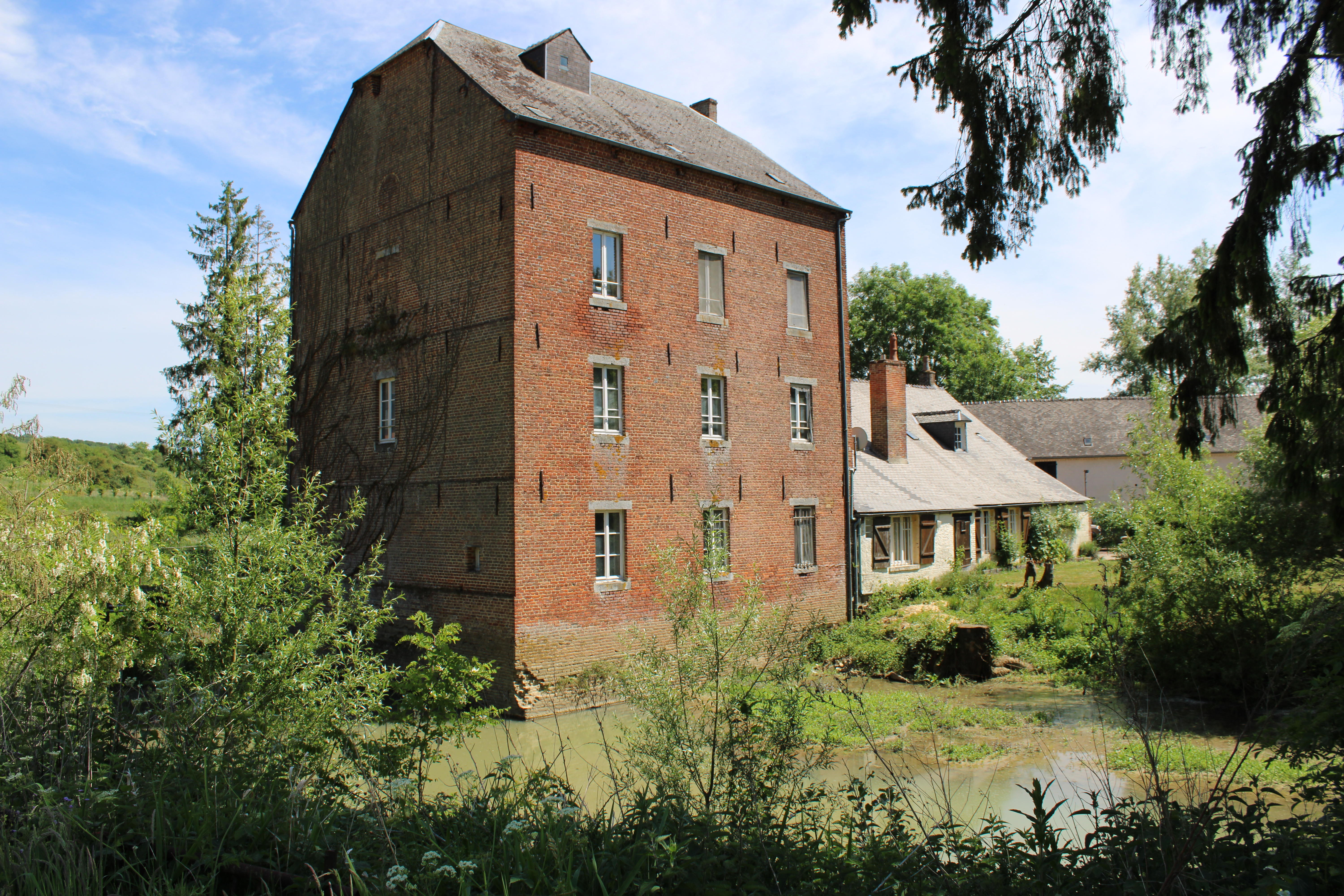 Le moulin situé sur la route de Chigny